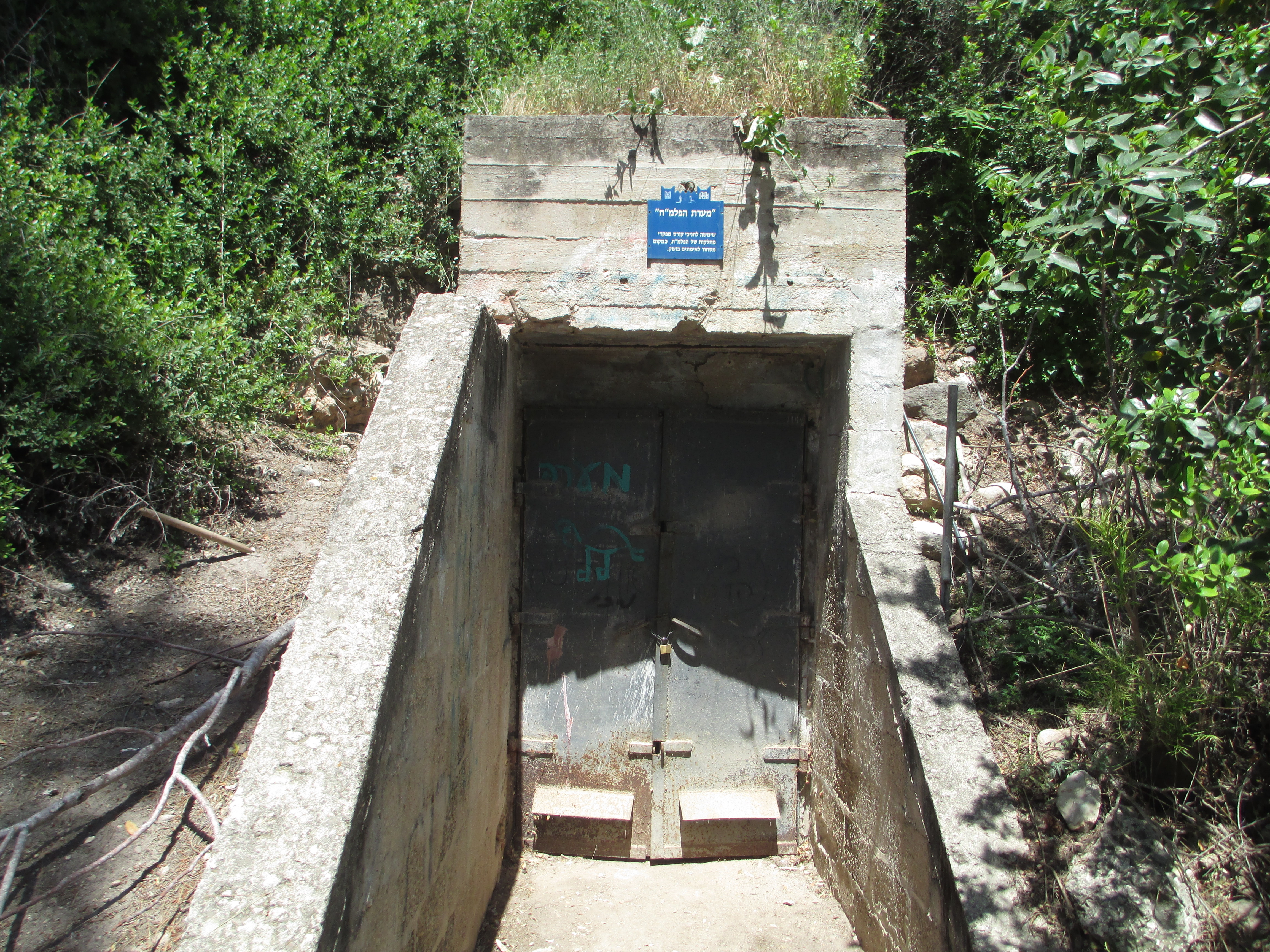 מערת הפלמ"ח בגינגר